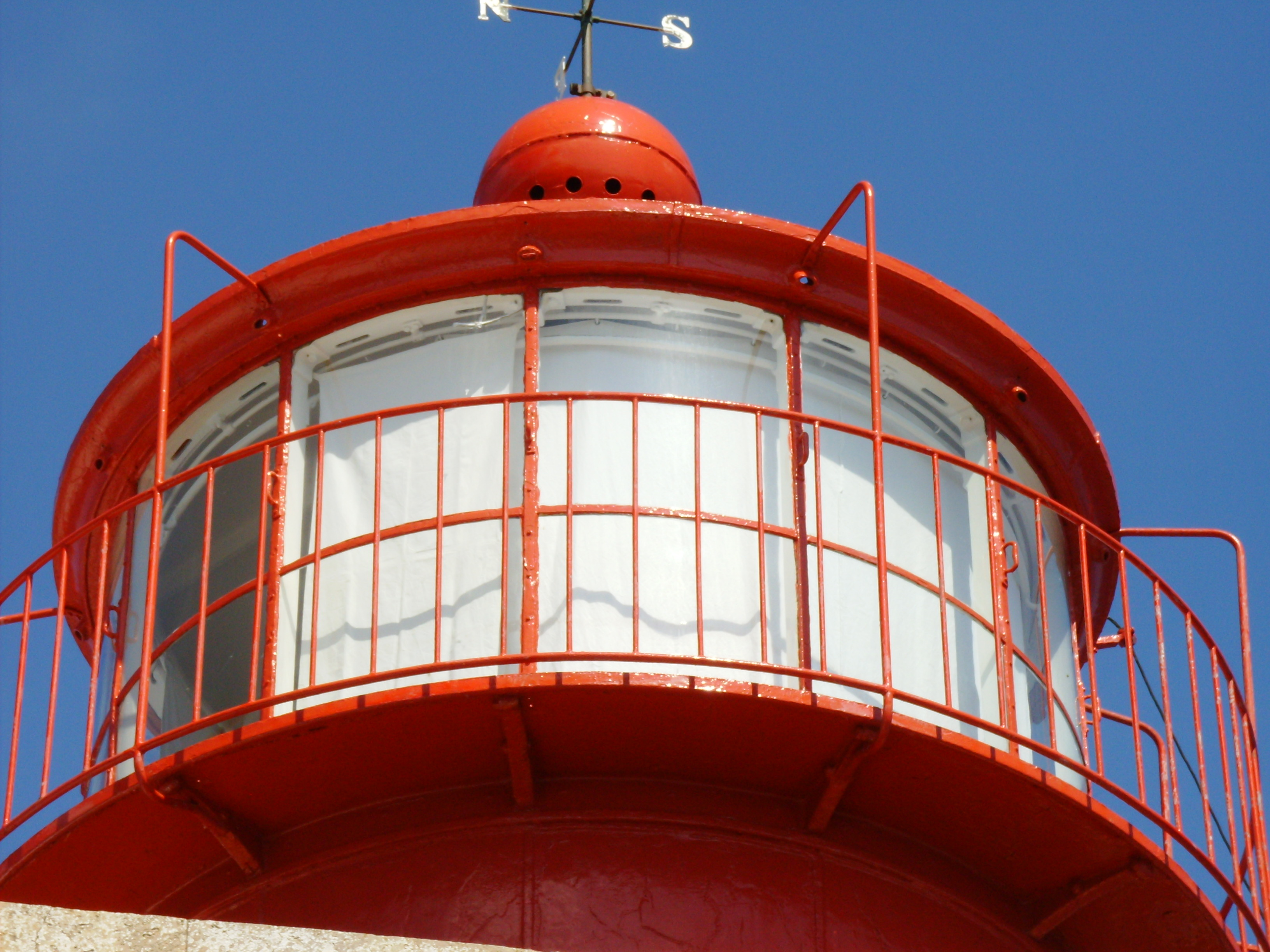 Farol de Gonçalo Velho, Ilha de Santa Maria (Açores), Portugal: detalhe da torre.